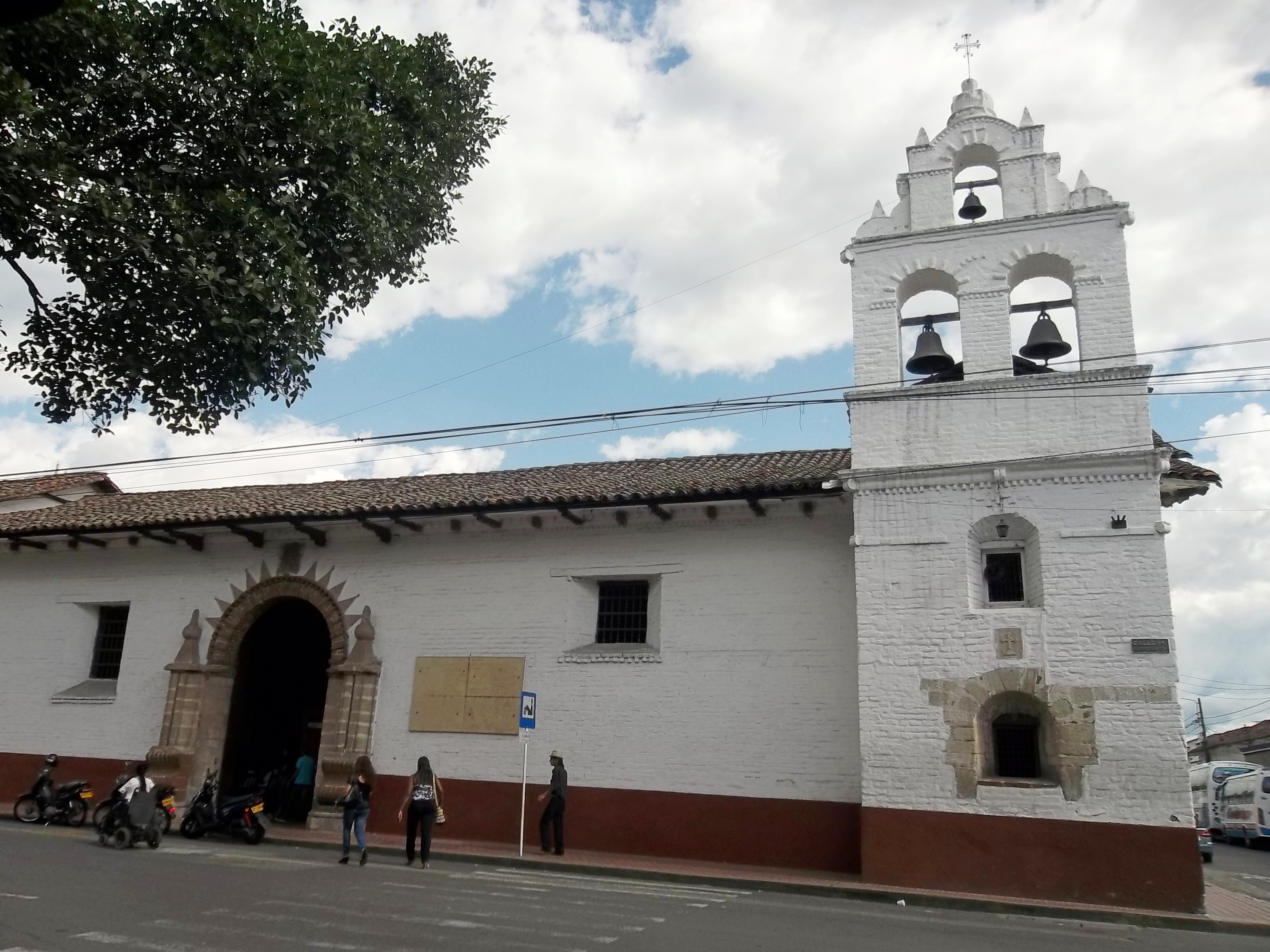 Sector Antiguo de la ciudad de Buga, Valle del Cauca, Colombia